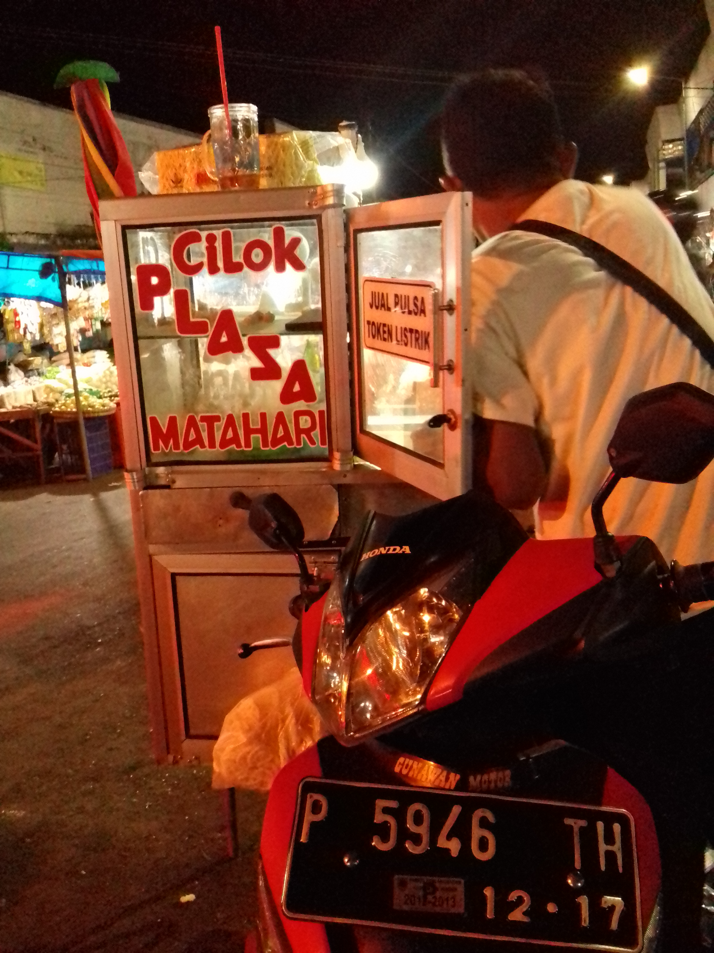 Cilok dijual dengan menggunakan sepeda motor, di depan Johar Plaza, Jember